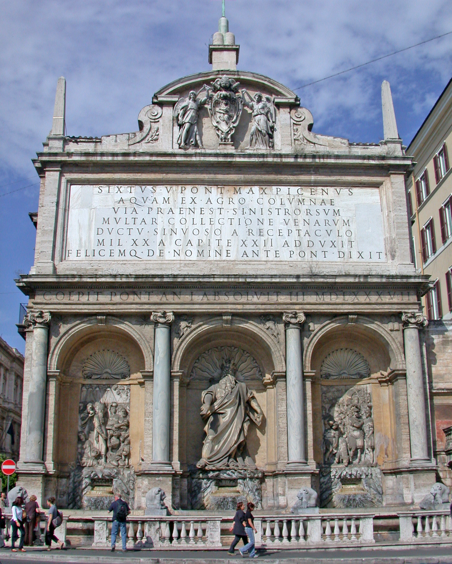 Fontana dell'Acqua Felice a Roma (eretta su ordine di papa Sisto V), punto terminale dell'acquedotto omonimo, a piazza San Bernardo. Foto personale (maggio 2005) by MM in it.wiki